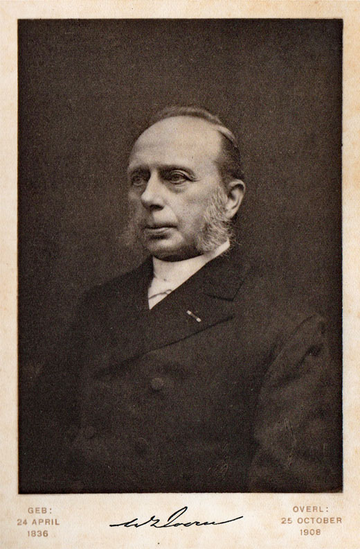 Portretfoto van Ds. Willem Doorn, gevonden in het boek "Overdenkingen", uitgegeven in 1909 door zijn kinderen, met een selectie van 32 van zijn preken.